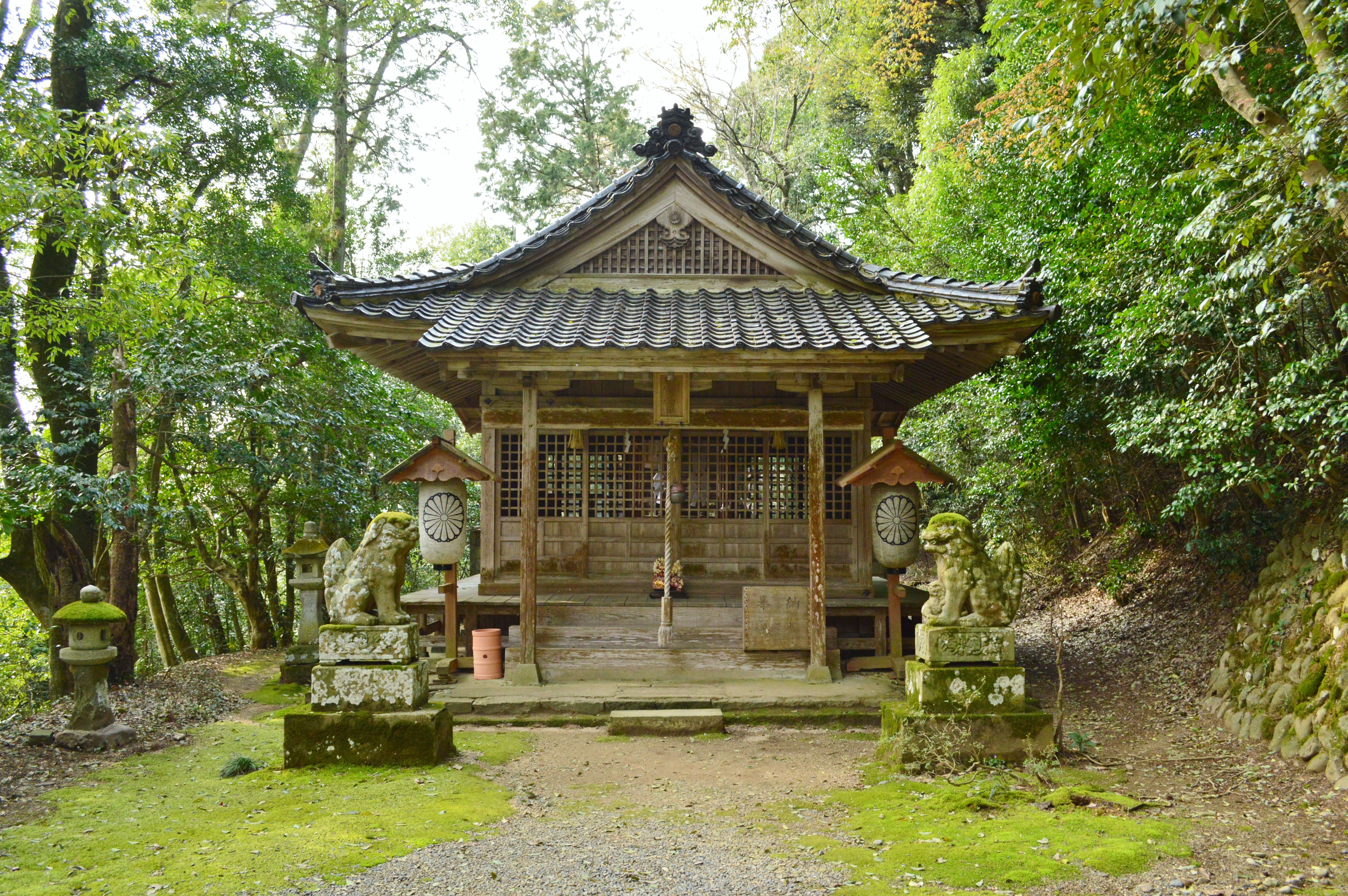 宇倍神社 境内国府神社 Nikon D3200